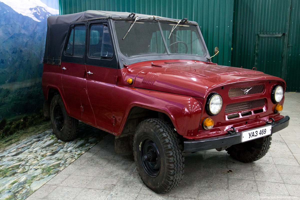 УАЗ-469. Выставочный павильон-музей УАЗа.